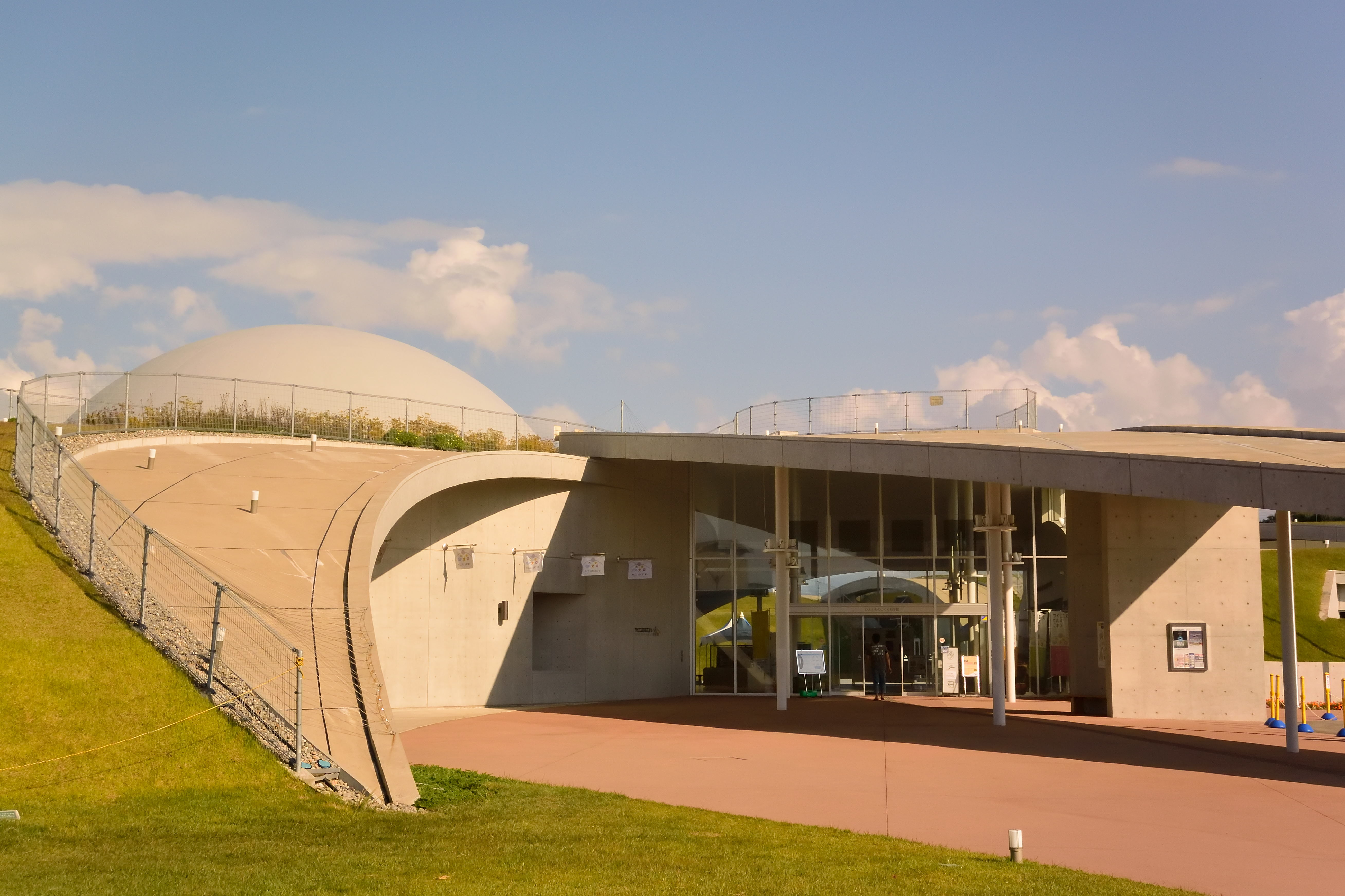 サイエンスヒルズこまつ入口